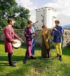 Schnurtrommel aus der Renaissance, Gotische Drehleier, Mittelalterliches Psalter, Dudey aus der Renaissance